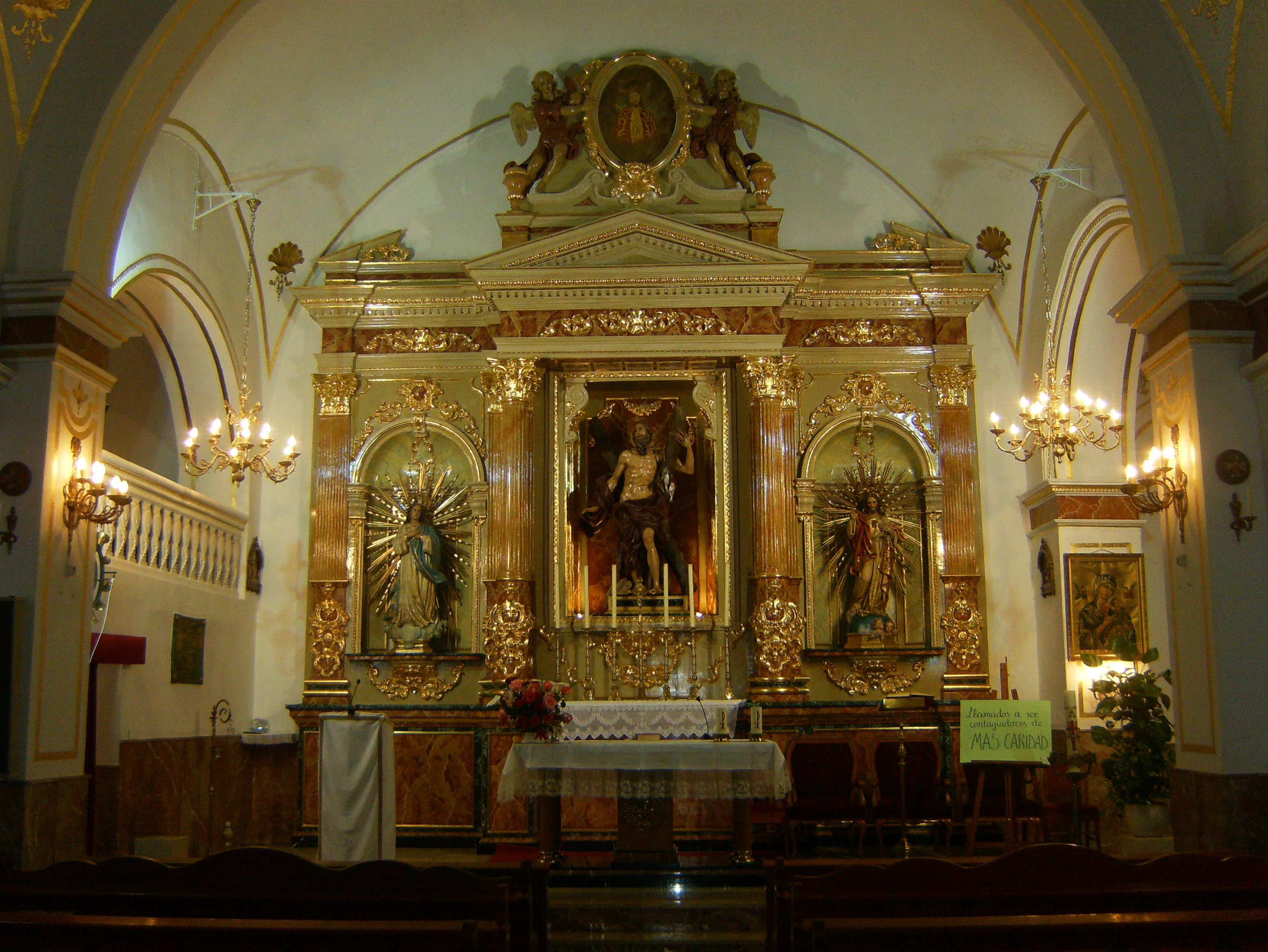 Altar Mayor de la Iglesia de Sant Andreu Apòstol de Benimeli